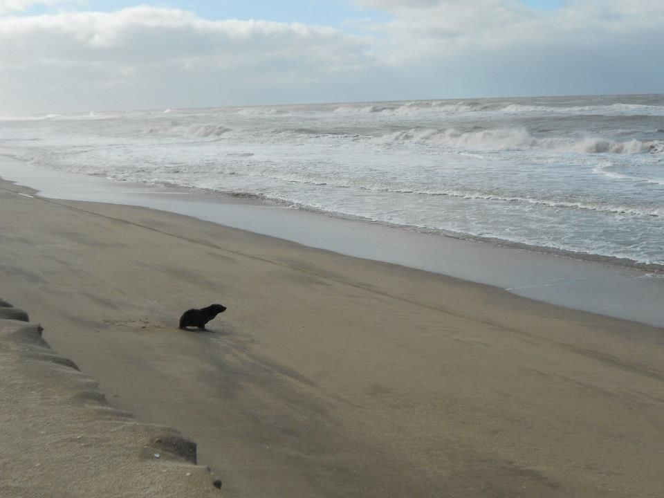 Paisaje de una playa